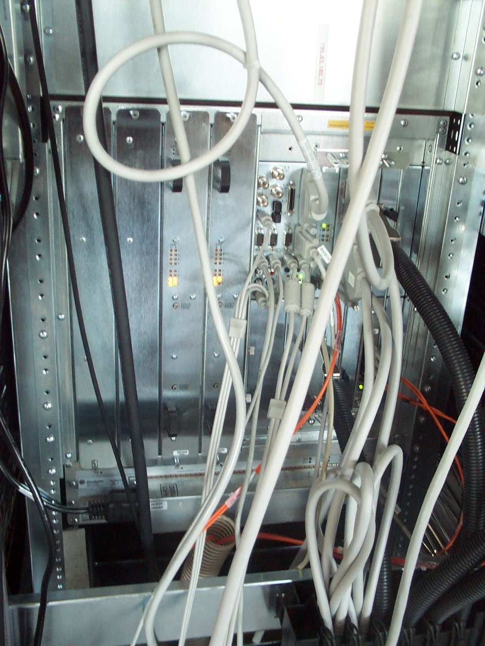 Module CPU d'une Onyx2, auteur JC Penalva